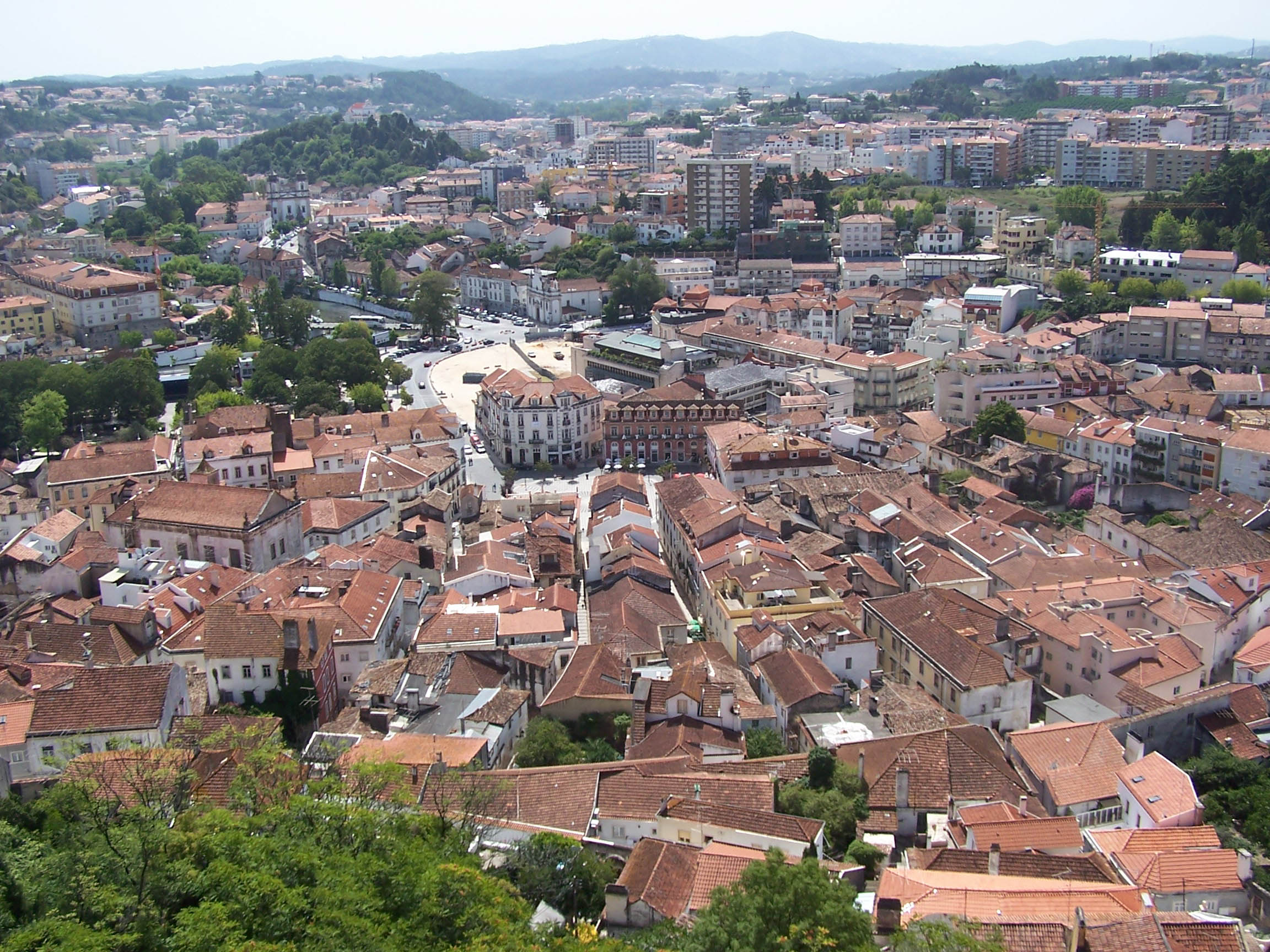 View of Leiria, Portugal